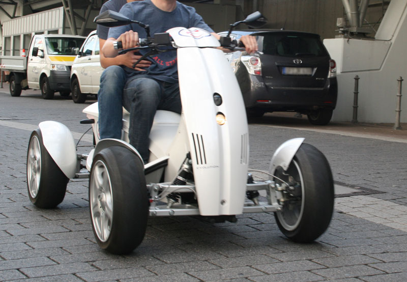 JETFLYER der Firma e-volution Elektromobilitätskonzepte GmbH auf der IAA 2011